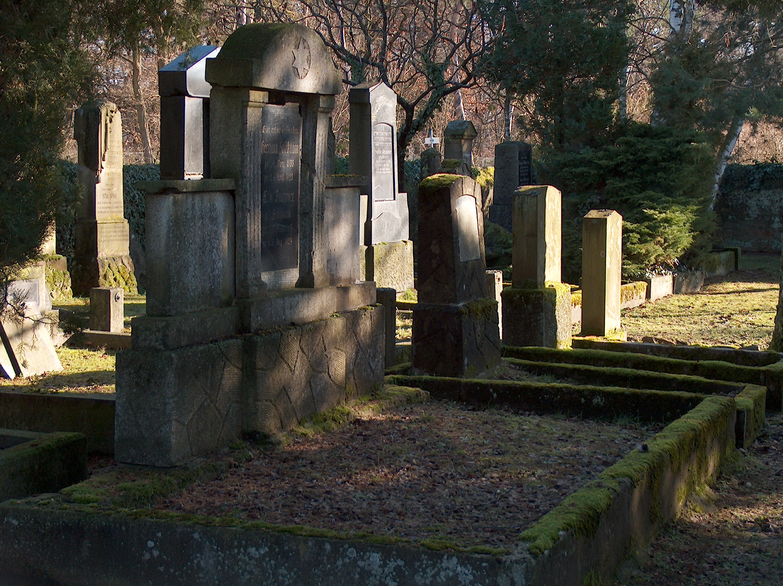 Jüdischer Friedhof (Hockenheim)